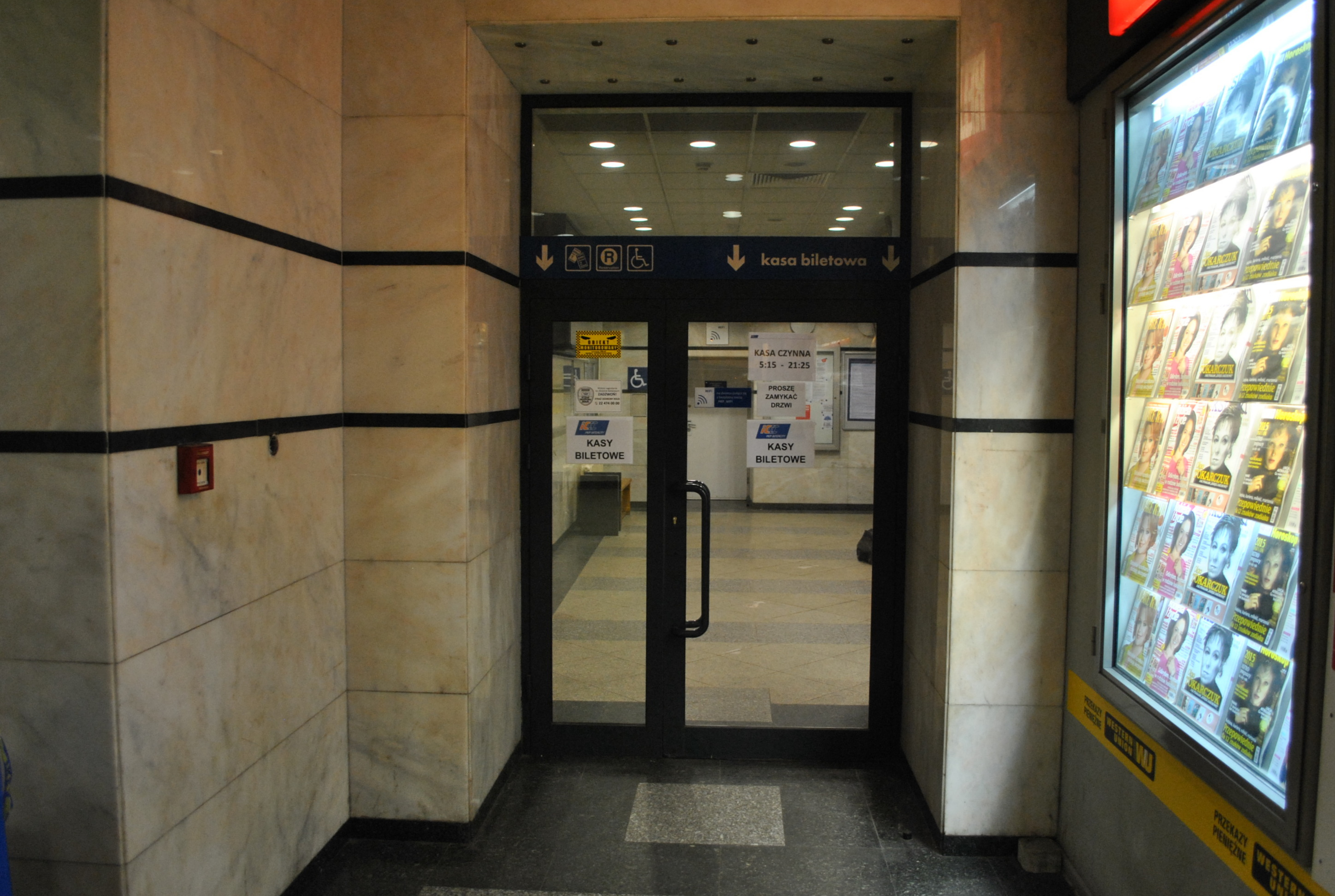 Stacja Sosnowiec Główny - kasa biletowa